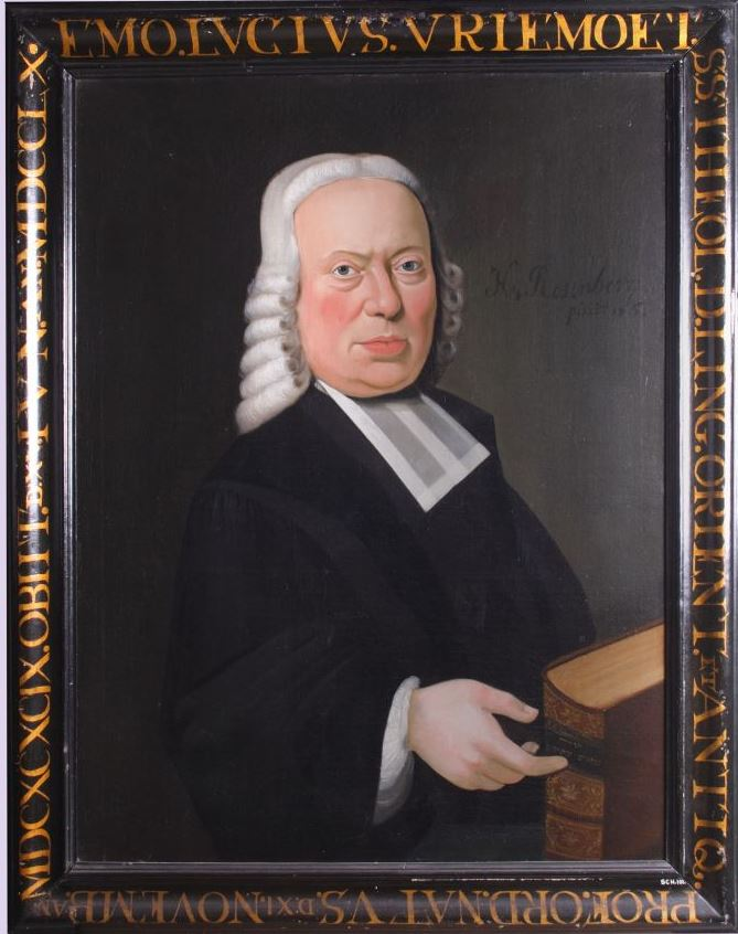 Portret in olieverf van professor Emo Lucius Vriemoet, hoogleraar Oosterse talen aan de Franeker universiteit van 1760 tot 1761 en vanaf 1740 tevens hoogleraar Hebreeuwse oudheden. Emo Lucius Vriemoet (Emden december 1699 - Franeker 15 juni 1760) was aanvankelijk predikant voor hij in 1731 hoogleraar in Franeker werd. (tekst Museum Martena)